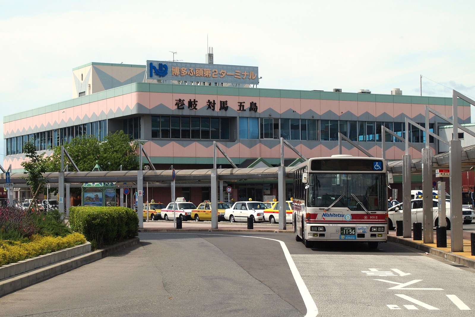 博多港 博多ふ頭 第二ターミナル